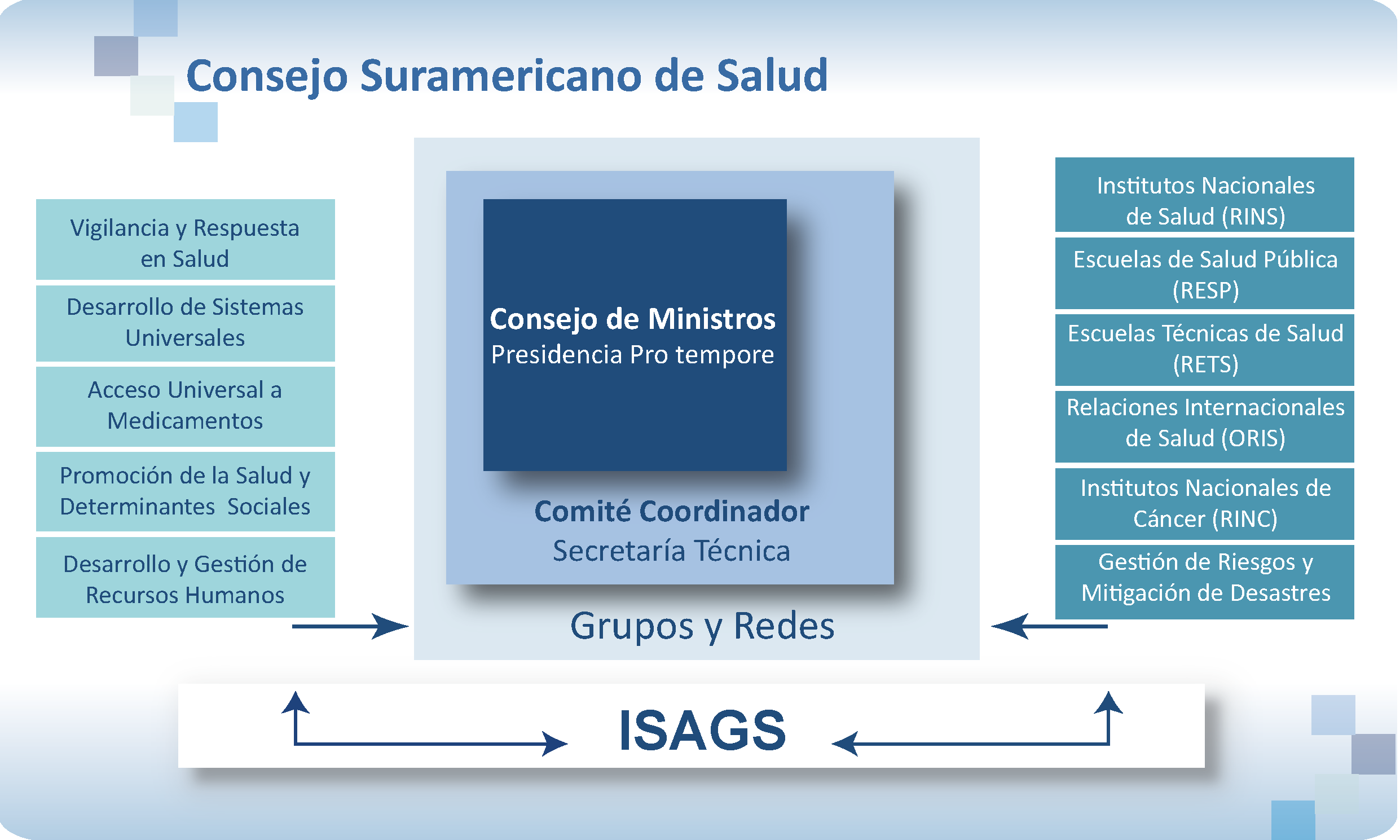 Organograma del Consejo Suramericano de Salud